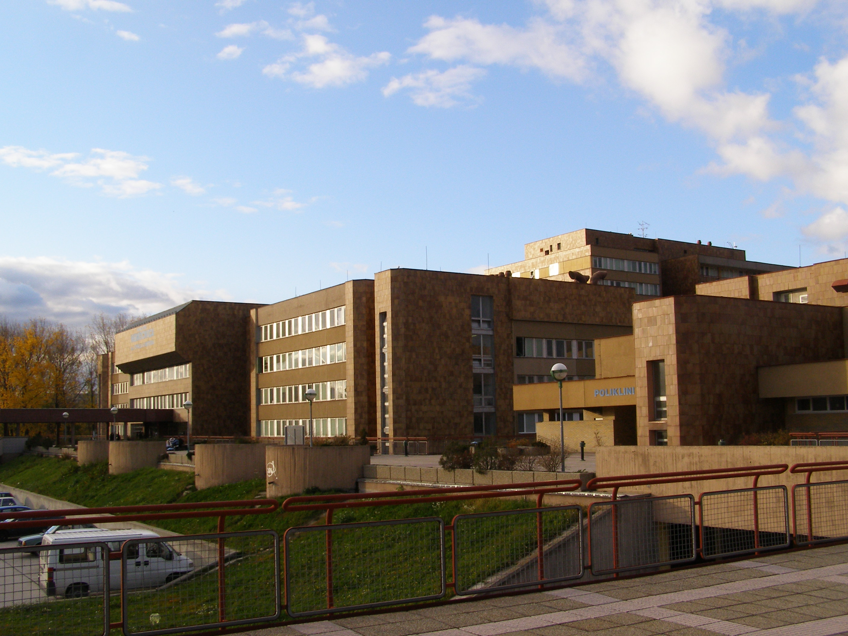 St. Cyril and Method Hospital in Petržalka, Bratislava, Slovakia